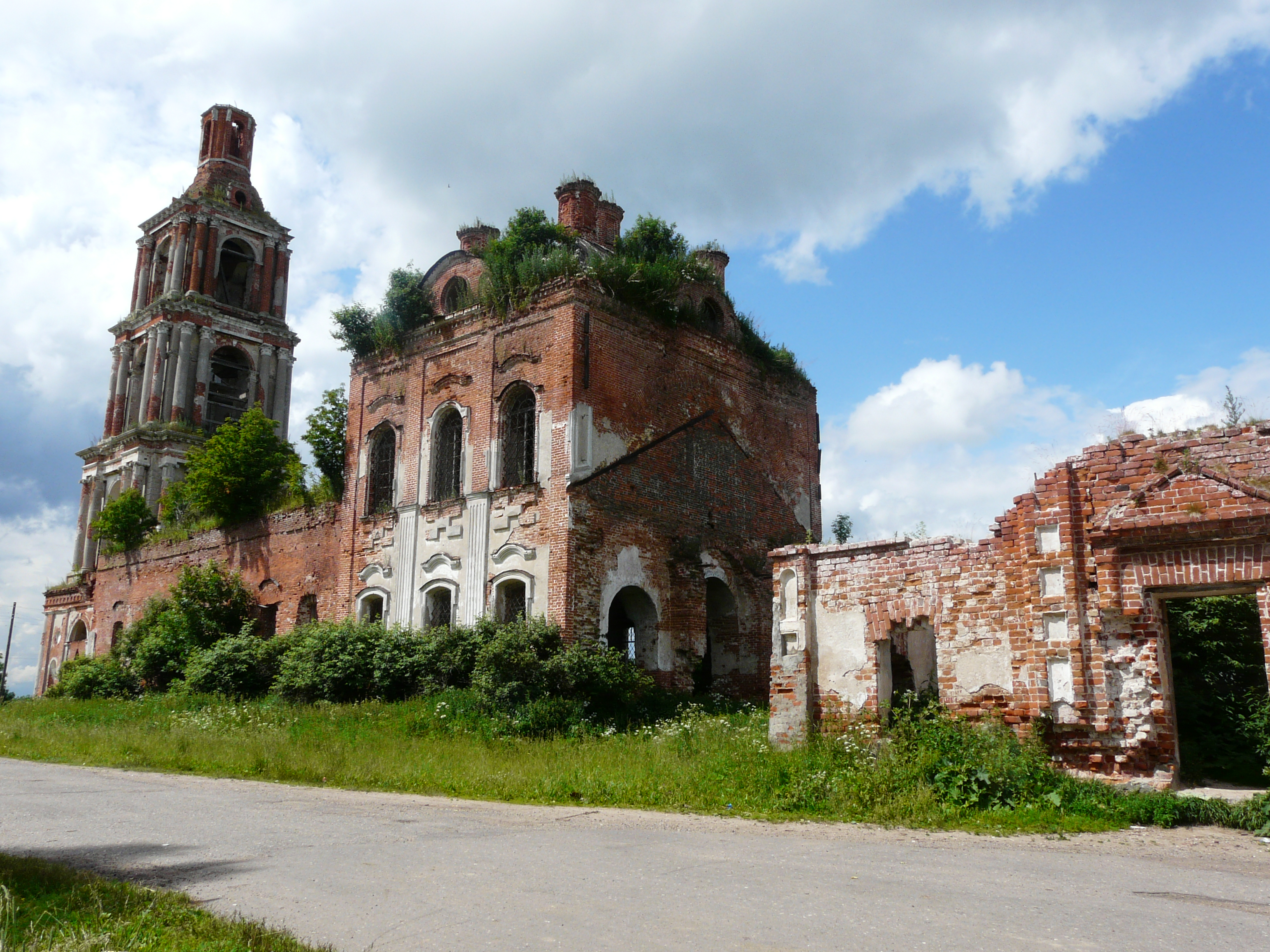 Церковь Живоначальной троицы, 1790г.